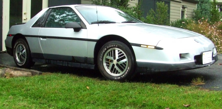 1986 Fiero SE 2M6